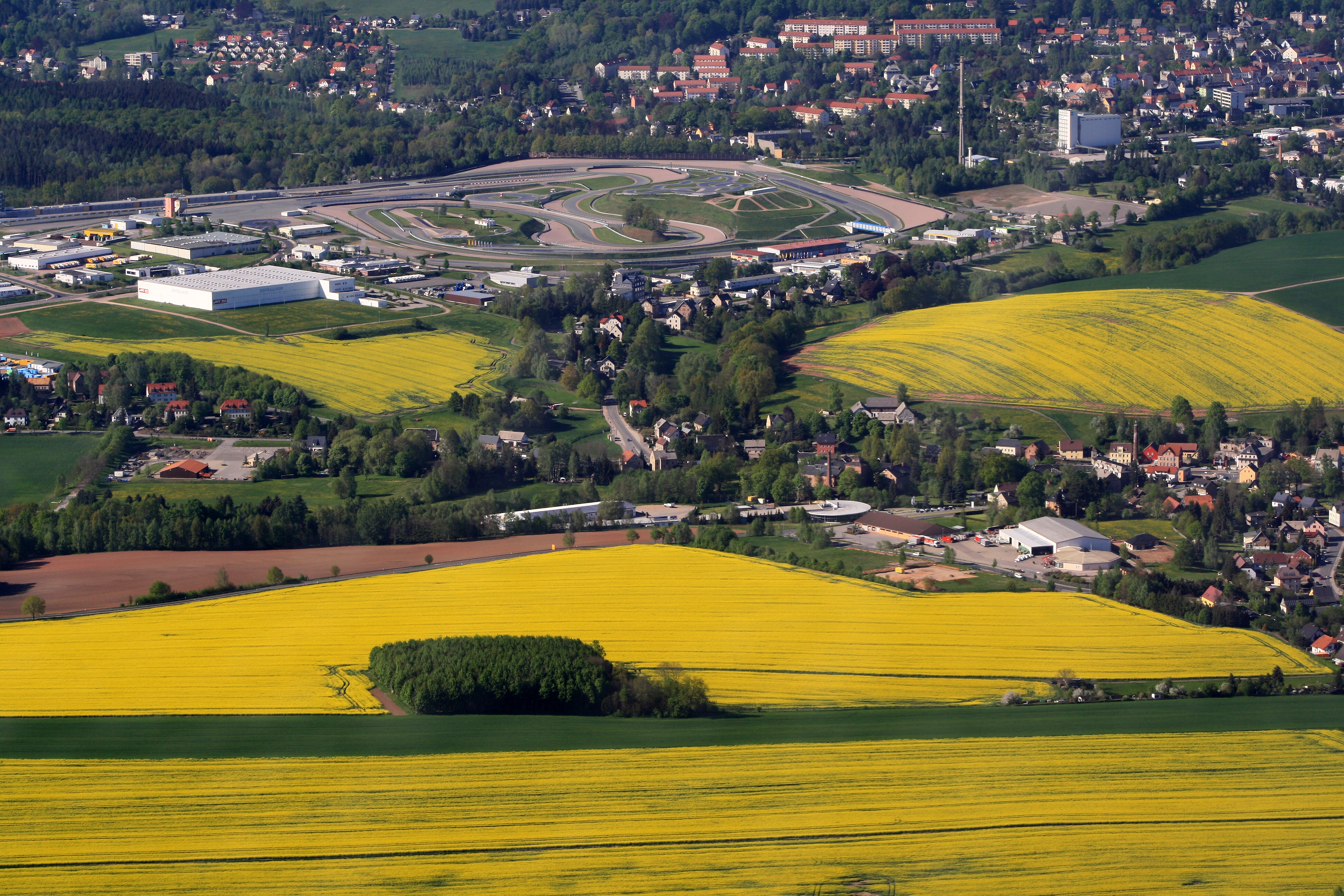 Landschaft bei Hohenstein-Ernstthal, Landkreis Zwickau, Sachsen, mit dem Sachsenring.